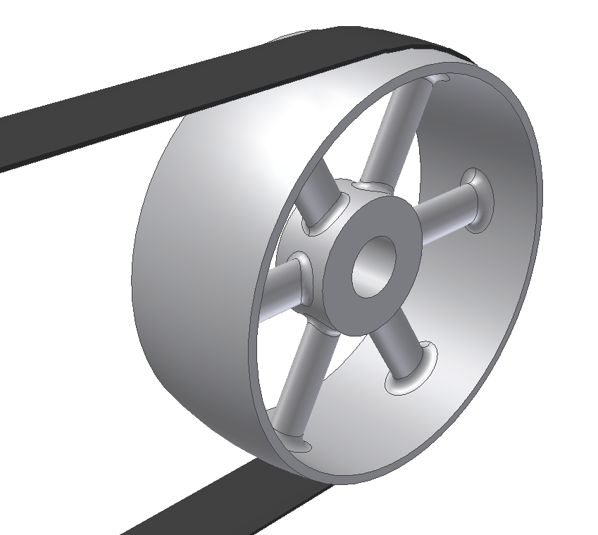 Flachriemenscheibe mit Riemen Own work, 2nd Aug. 2006, Borowski